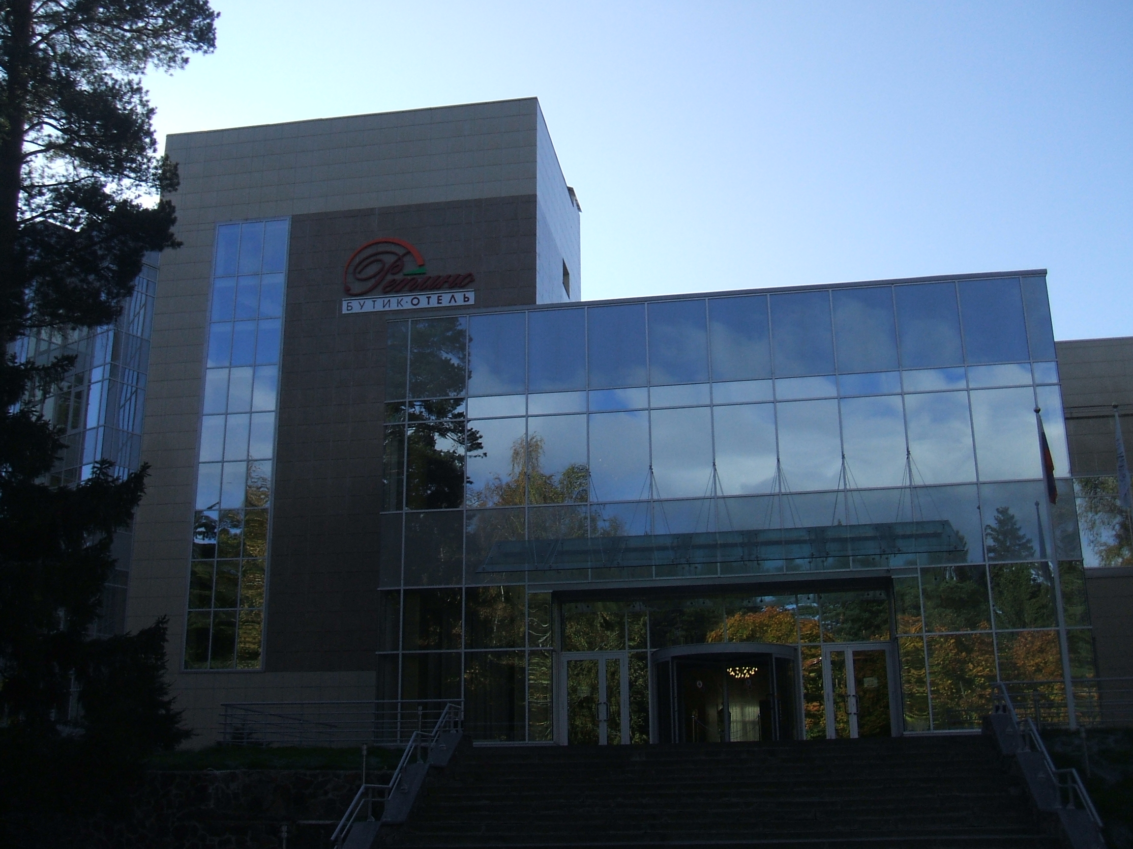 Бутик Отель в Репино Санкт-Петербурга